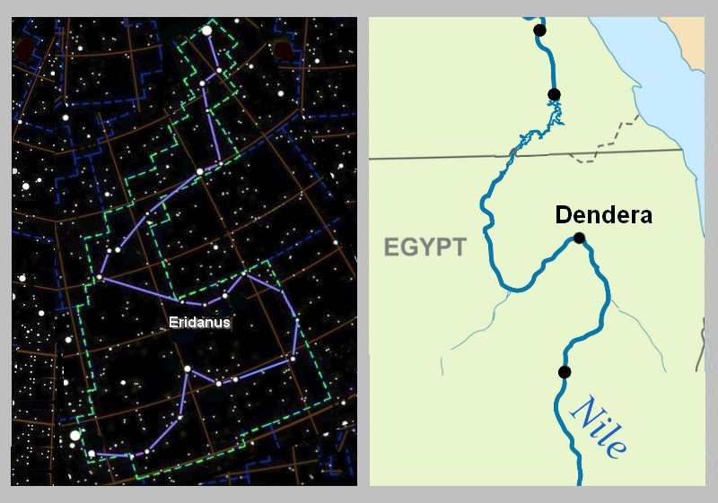 Vue aérienne de la partie du Fleuve Nil au dessus du Temple de Denderah en Egypte.